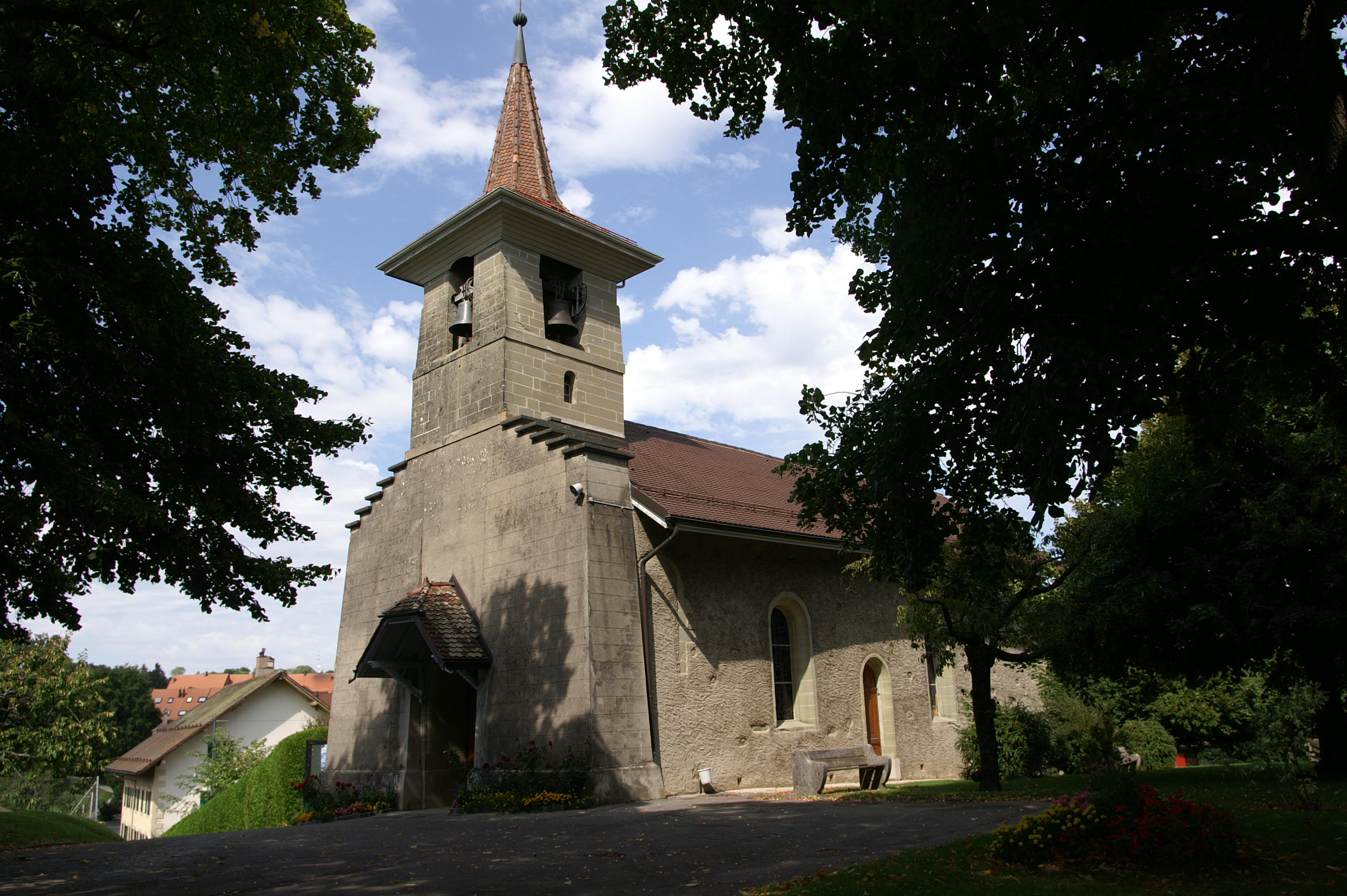 Église de Savigny.